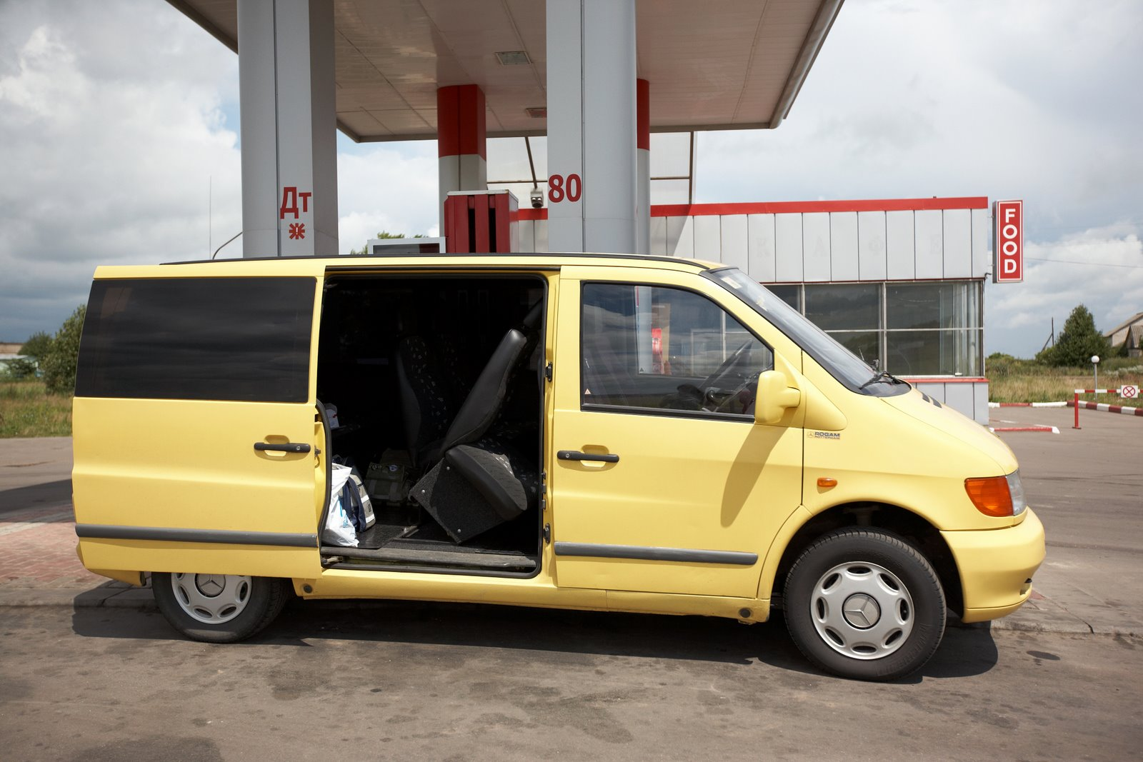 Oryol